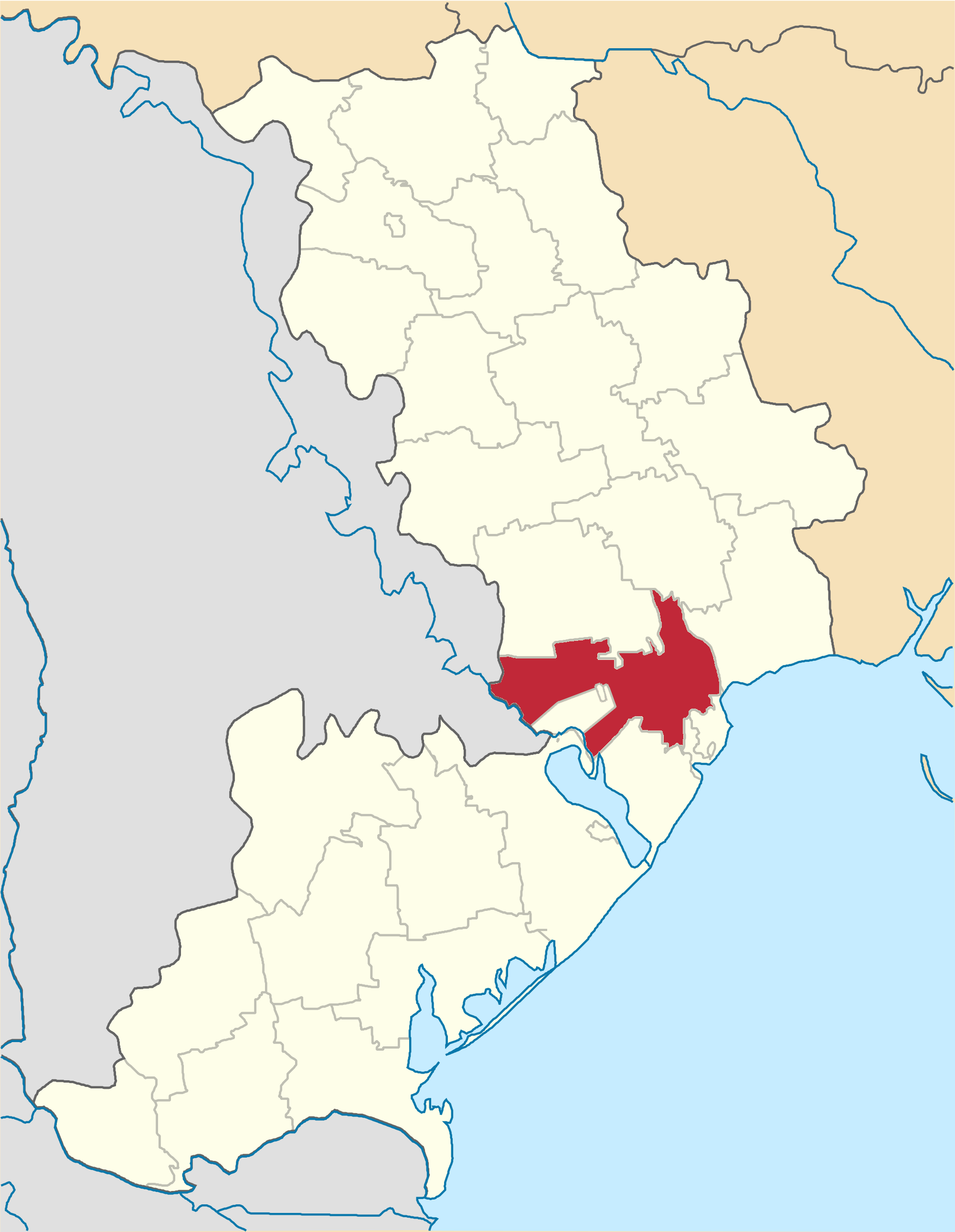 Bilyayivskyi-Raion map